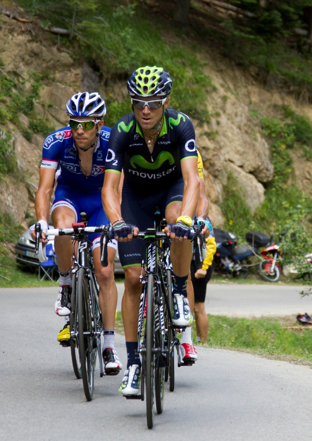 092 groep gele trui met valverde en pinot